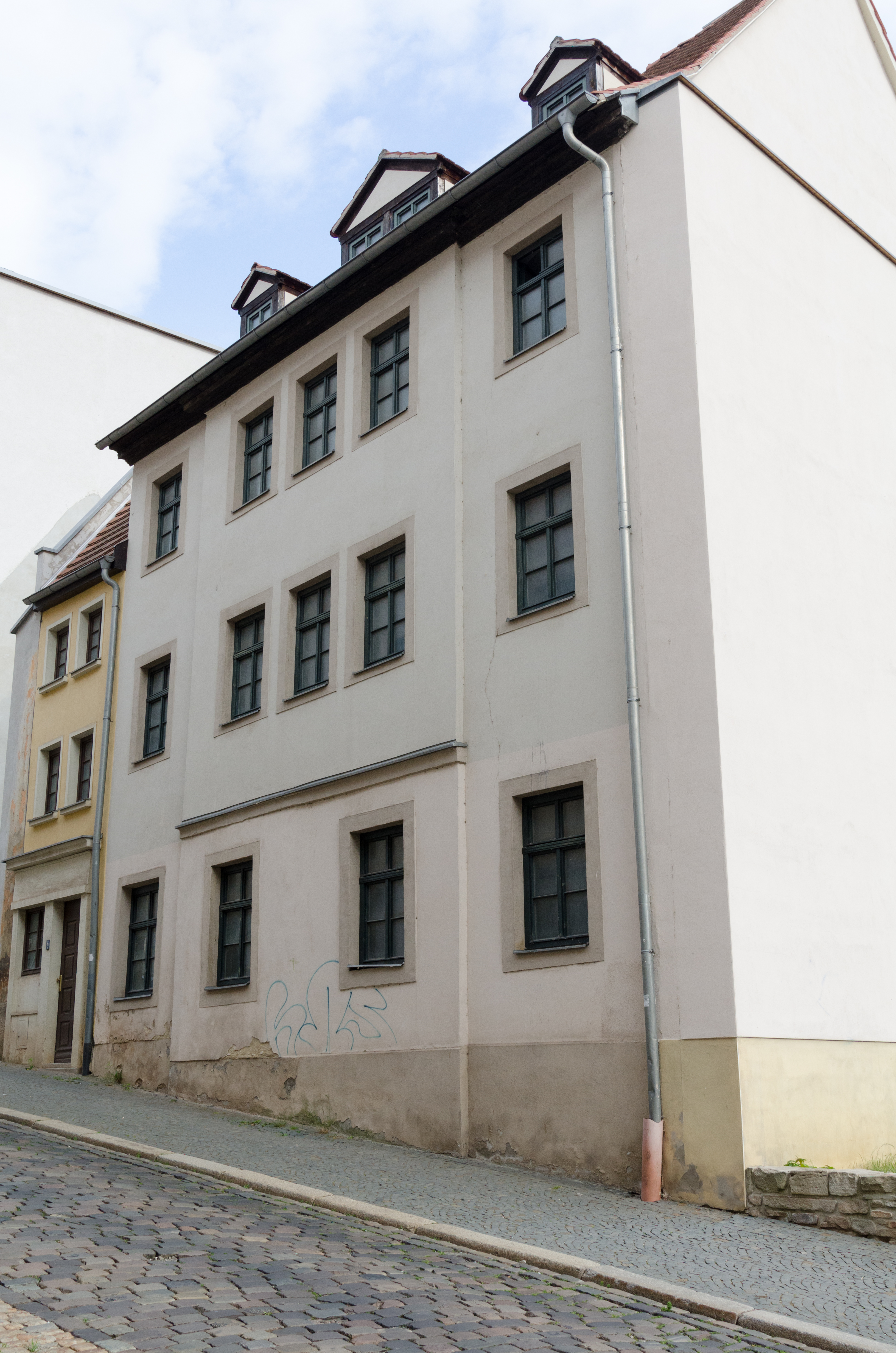 Zeitz, Messerschmiedestraße 18